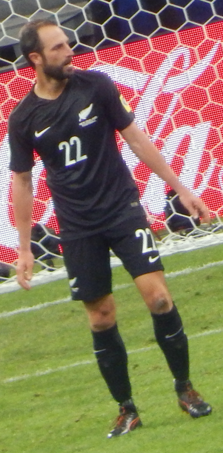 Эндрю Дюрант в матче против сборной Мексики